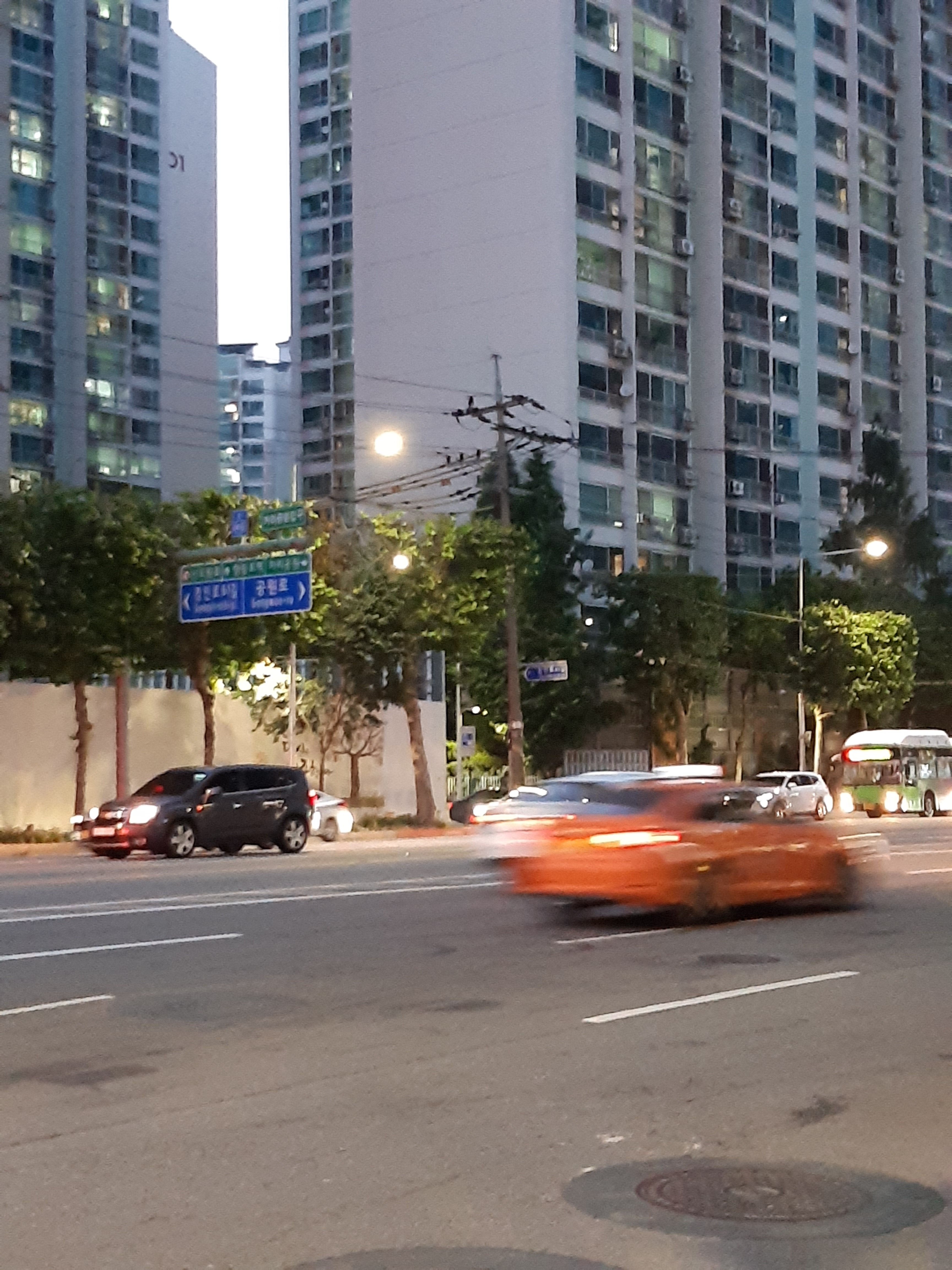 신도림동 46번국도